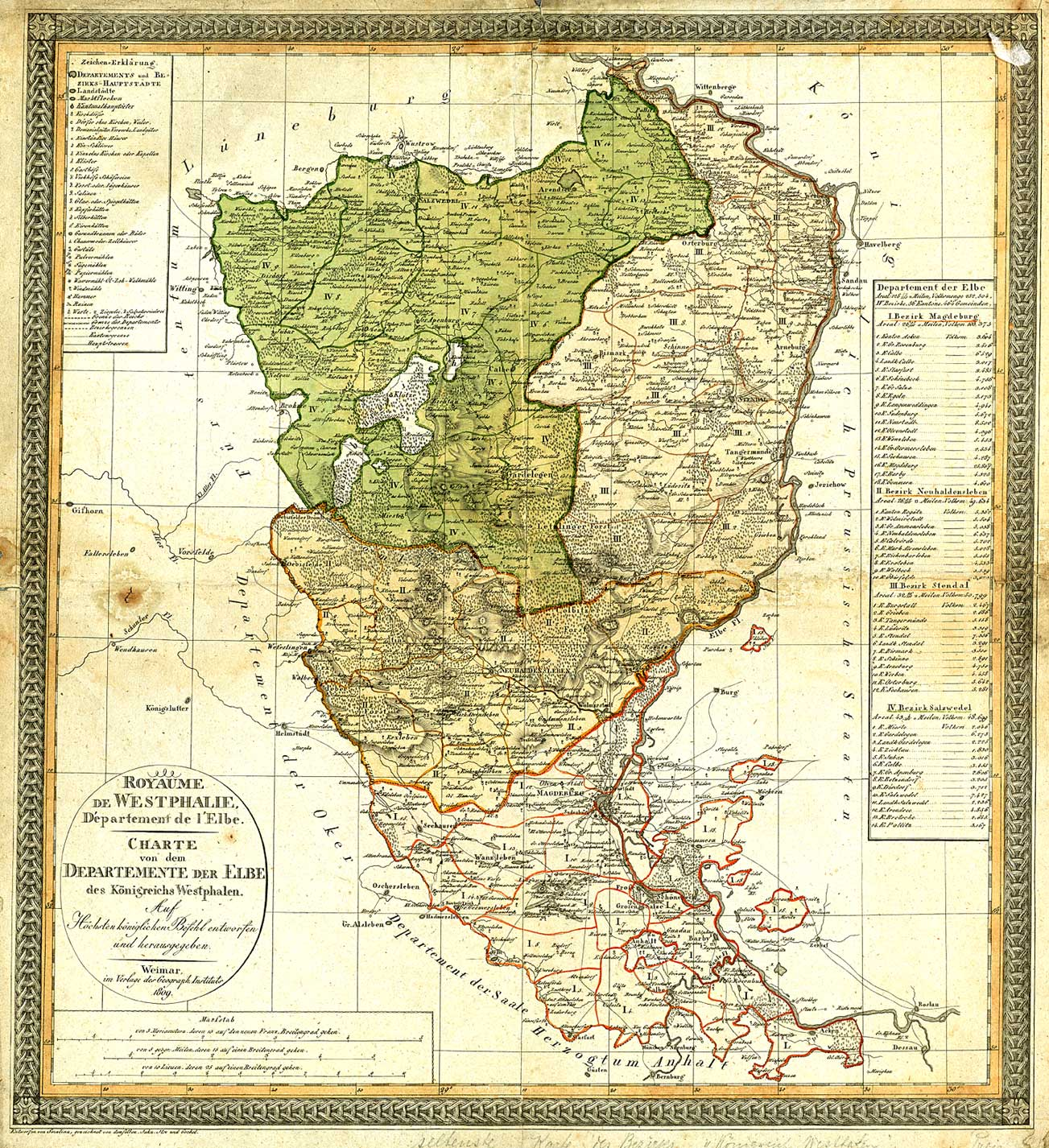 Charte von dem Departement der Elbe des Königreichs Westpahlen 1809